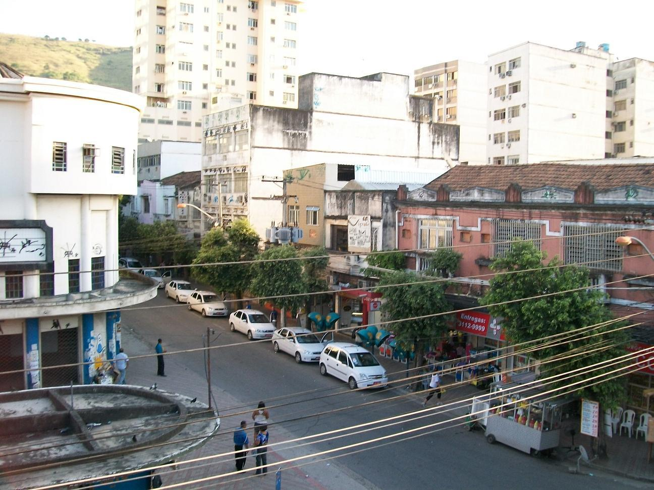 Centro de Nova Iguaçu.